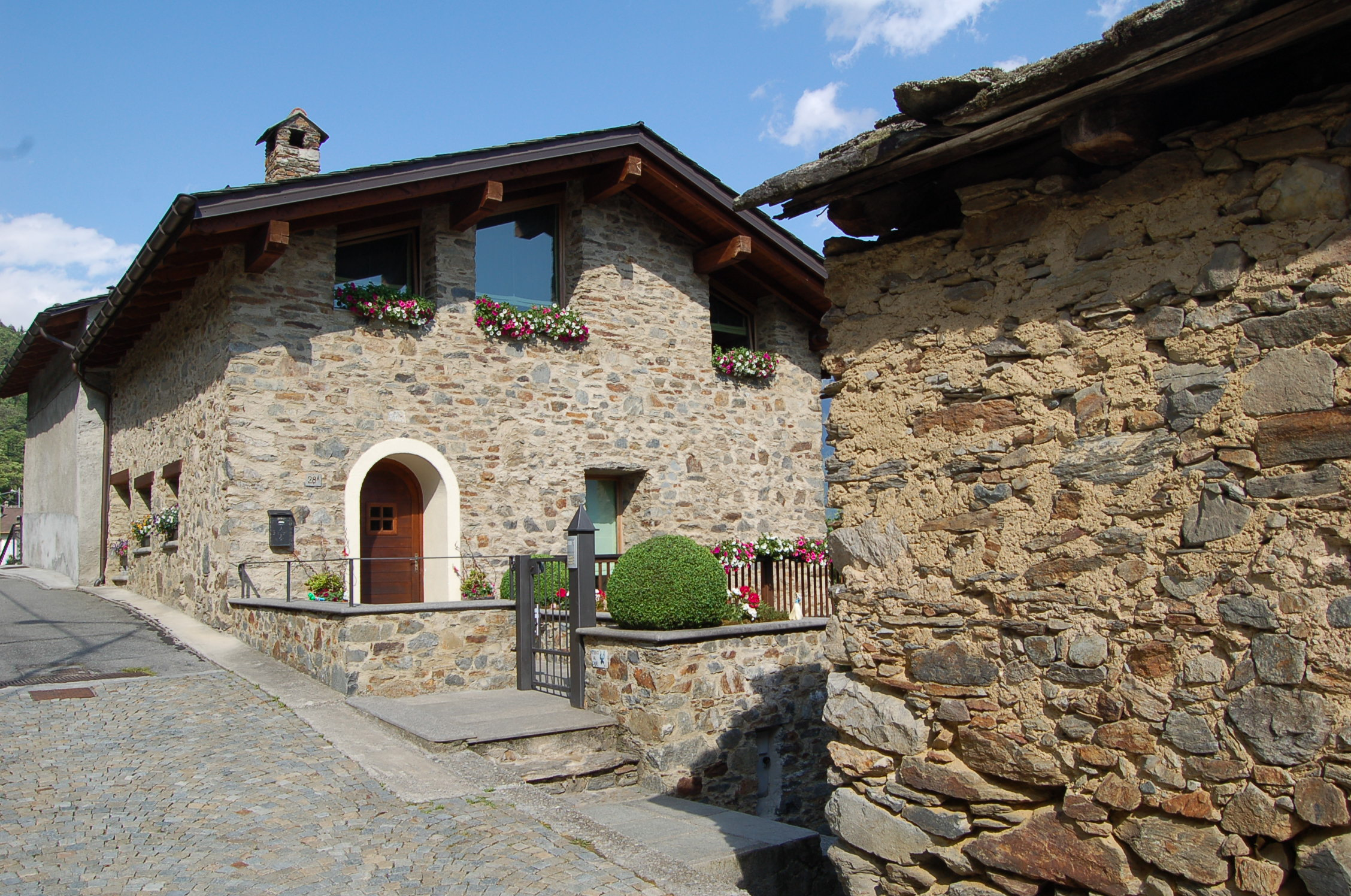 Scorcio di una contrada di Baruffini - Tirano - Sondrio